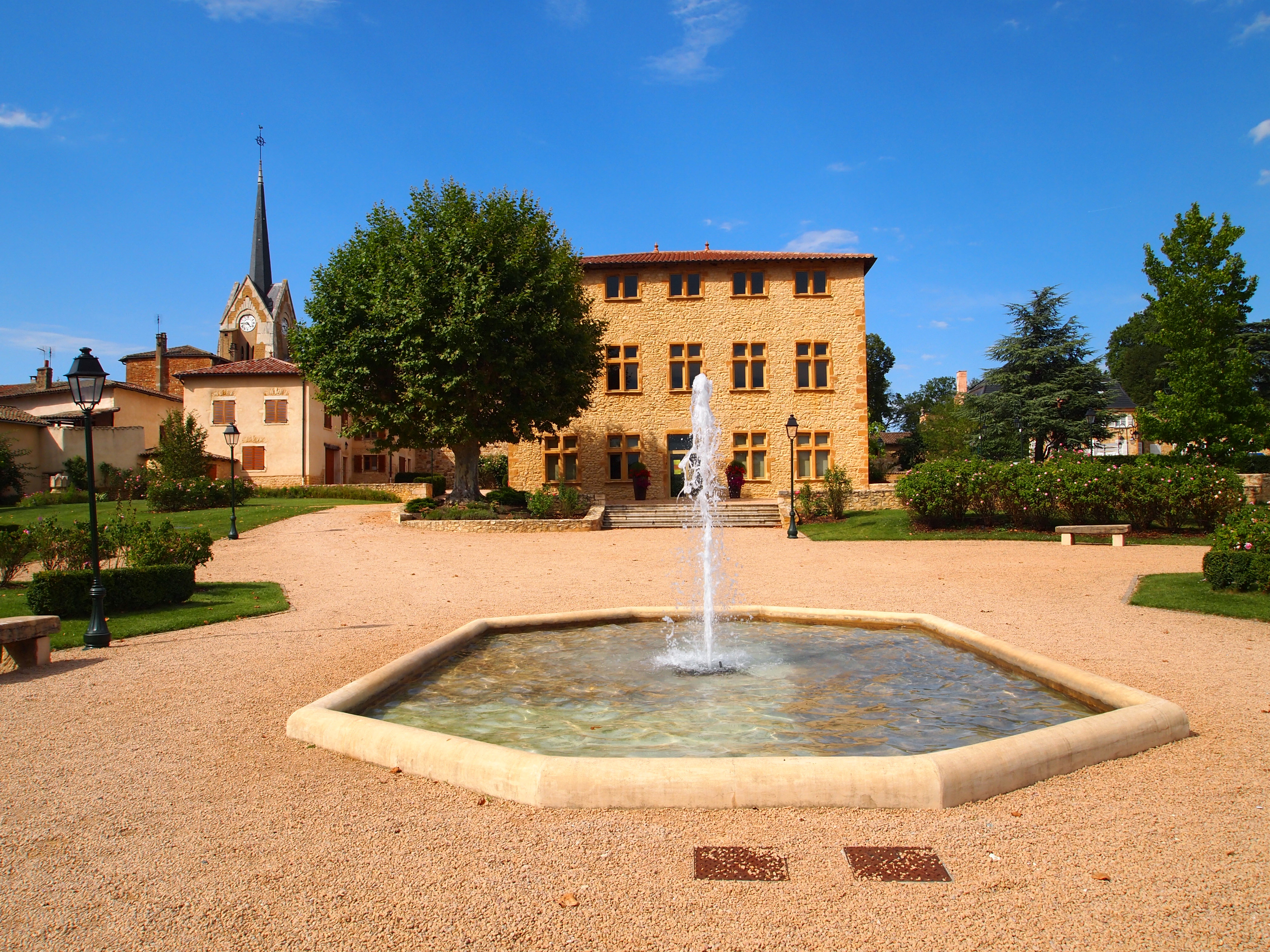 Mairie d'Arnas.